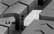 Zomm sur le temoin d'usure d'un pneumatique de tourisme